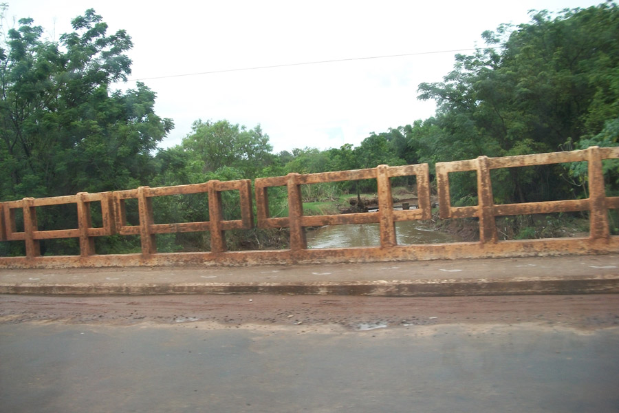 Ponte do Ribeirão Baguaçu, vista de um veículo em movimento na Rua dos Fundadores, Araçatuba, São Paulo.